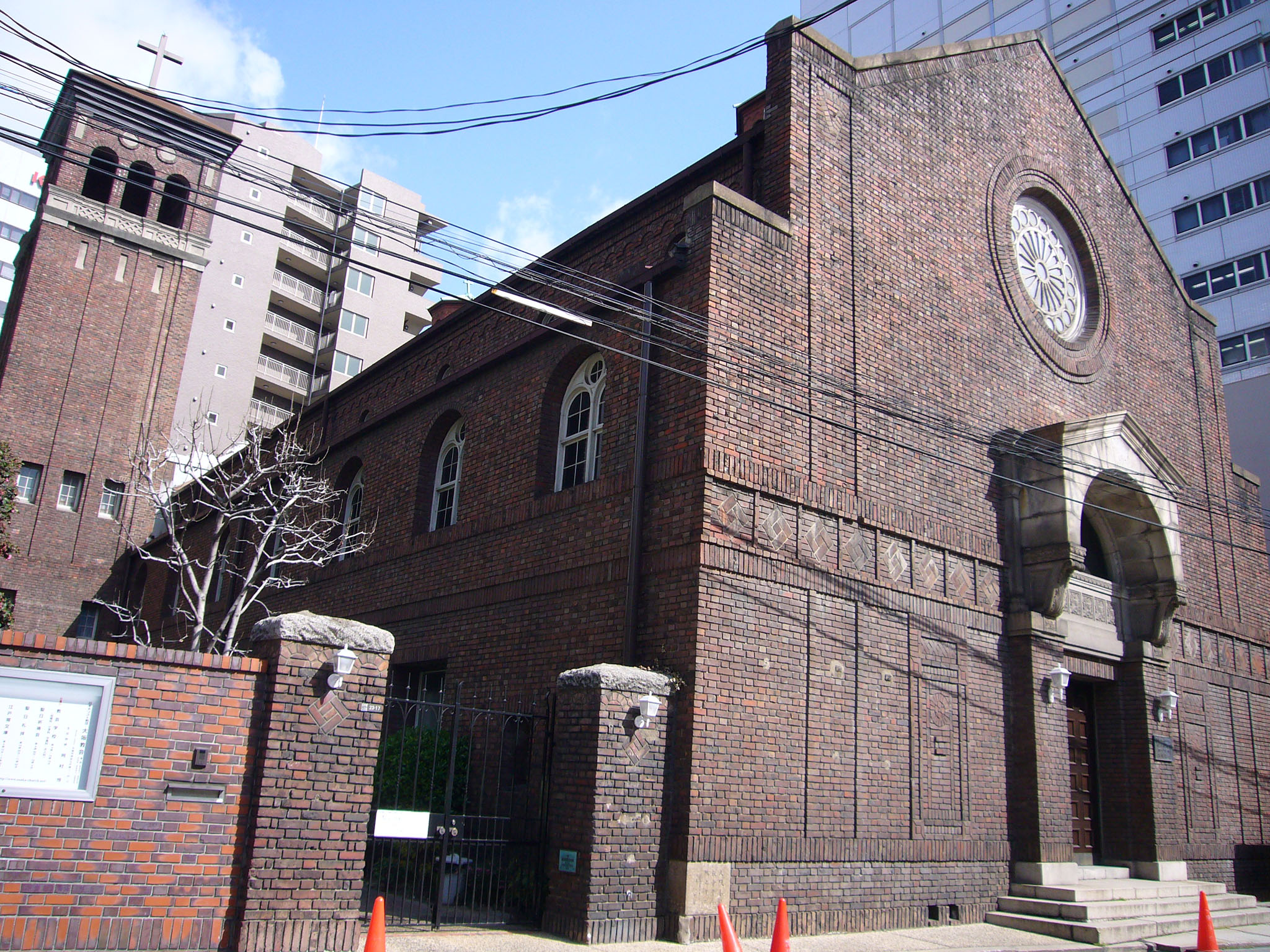 UCCJ Osaka Church in Osaka, Japan